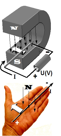 Mechanické působení elektrických proudů